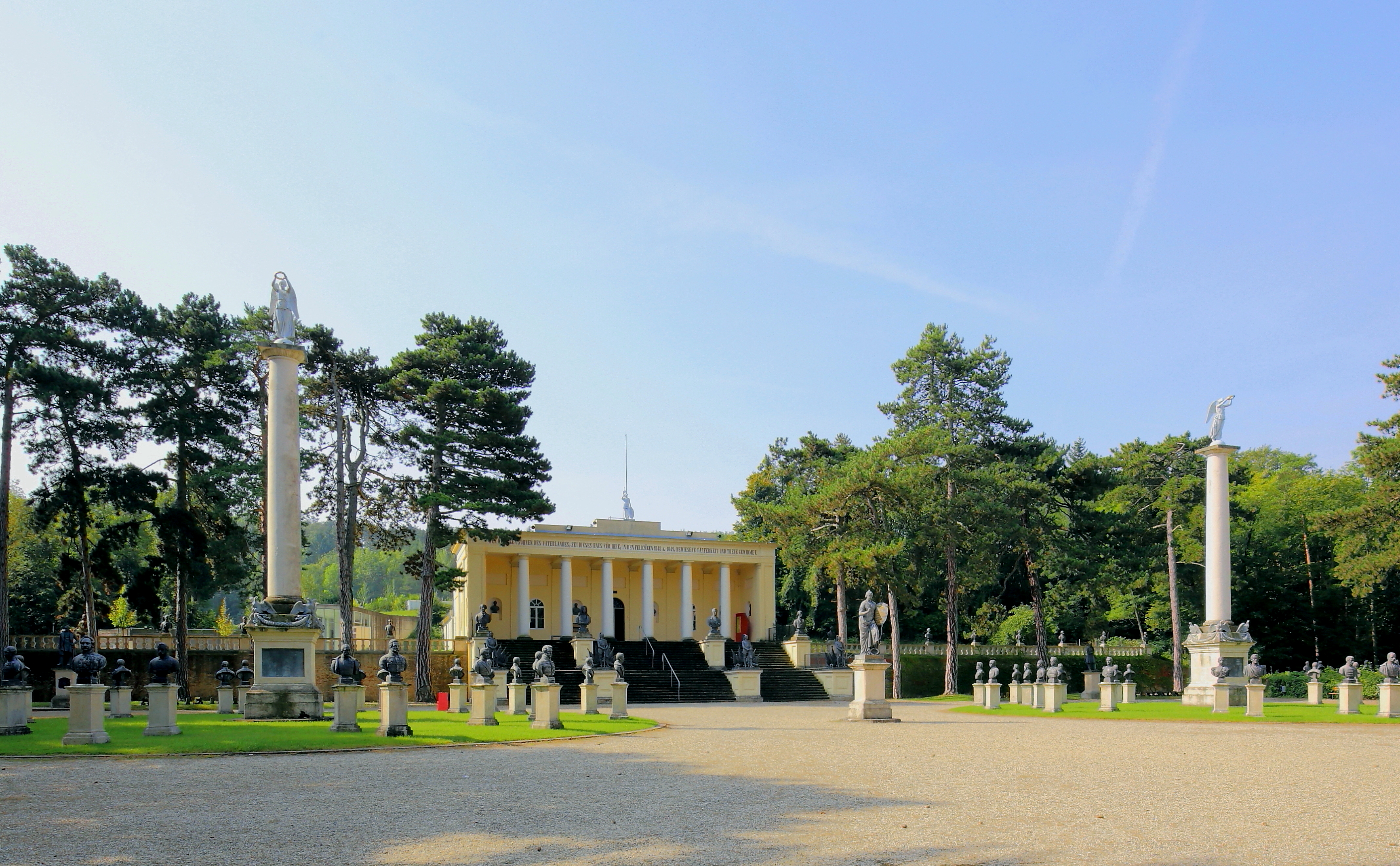 Die Gedenkstätte Heldenberg in Kleinwetzdorf, ein Ortsteil der niederösterreichischen Gemeinde Heldenberg. Sie wurde von Joseph Gottfried Ritter von Pargfrieder Mitte des 19. Jahrhundert westsüdwestlich des Schlosses Wetzdorf, das er 1832 kaufte, errichtet. Links die Siegessäule mit 24 Büsten von Teilnehmern am Italienfeldzug (1848/49), rechts die Siegessäule mit 24 Büsten von Teilnehmern des Ungarnfeldzuges (1848/49), in der Mitte die Klio-Statue und dahinter die Säulenhalle.